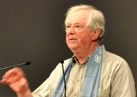 Fulbert Steffensky auf dem Deutschen Evangelischen Kirchentag 2009 in Bremen, Deutschland. (Bibel und Kirche - Fulbert Steffensky, Hamburg, spricht vor der überfüllten Hanse-Halle)